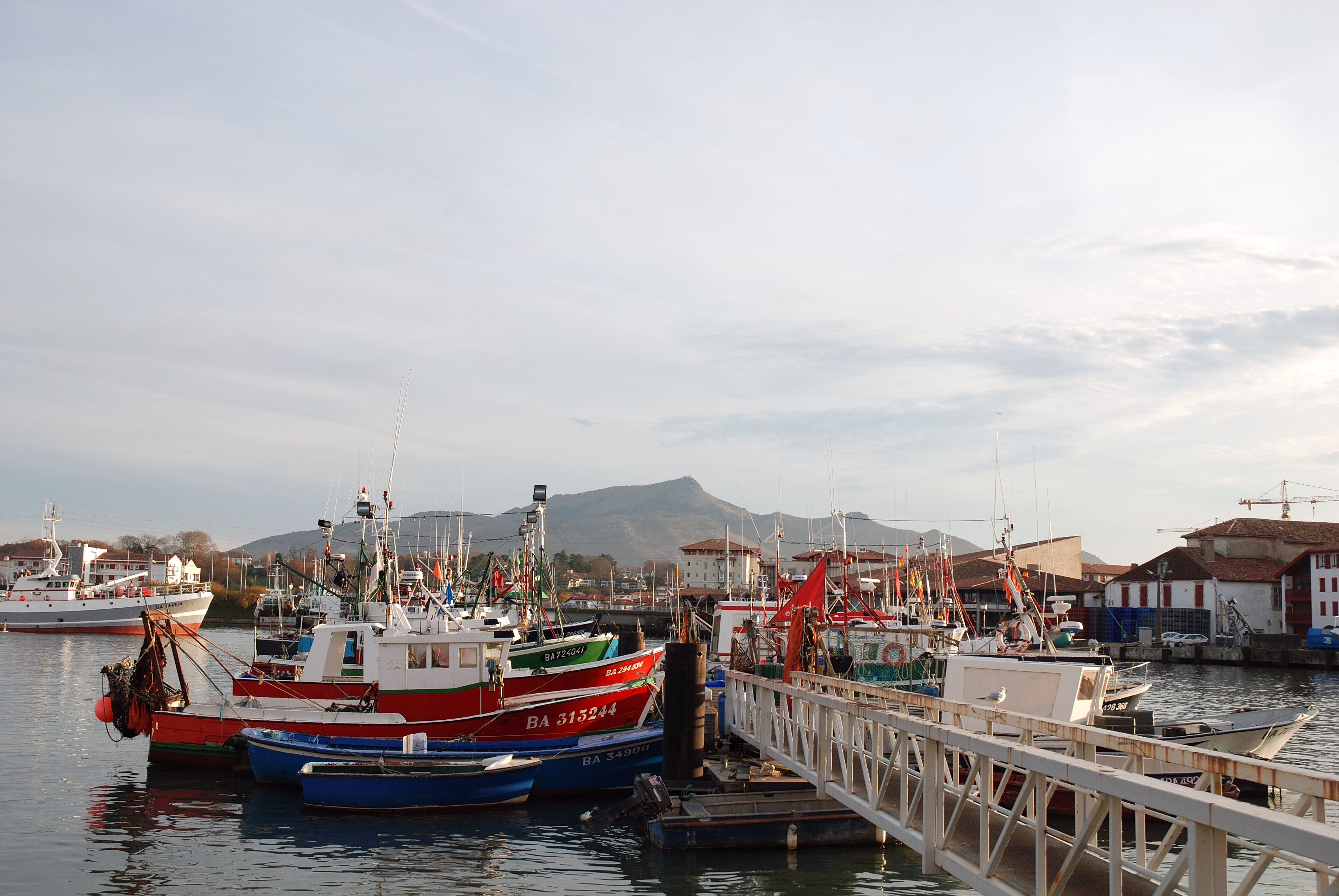 Saint-Jean-de-Luz, le port, avec la Rhune en toile de fond. Photo prise le 03/01/07 par Harrieta171